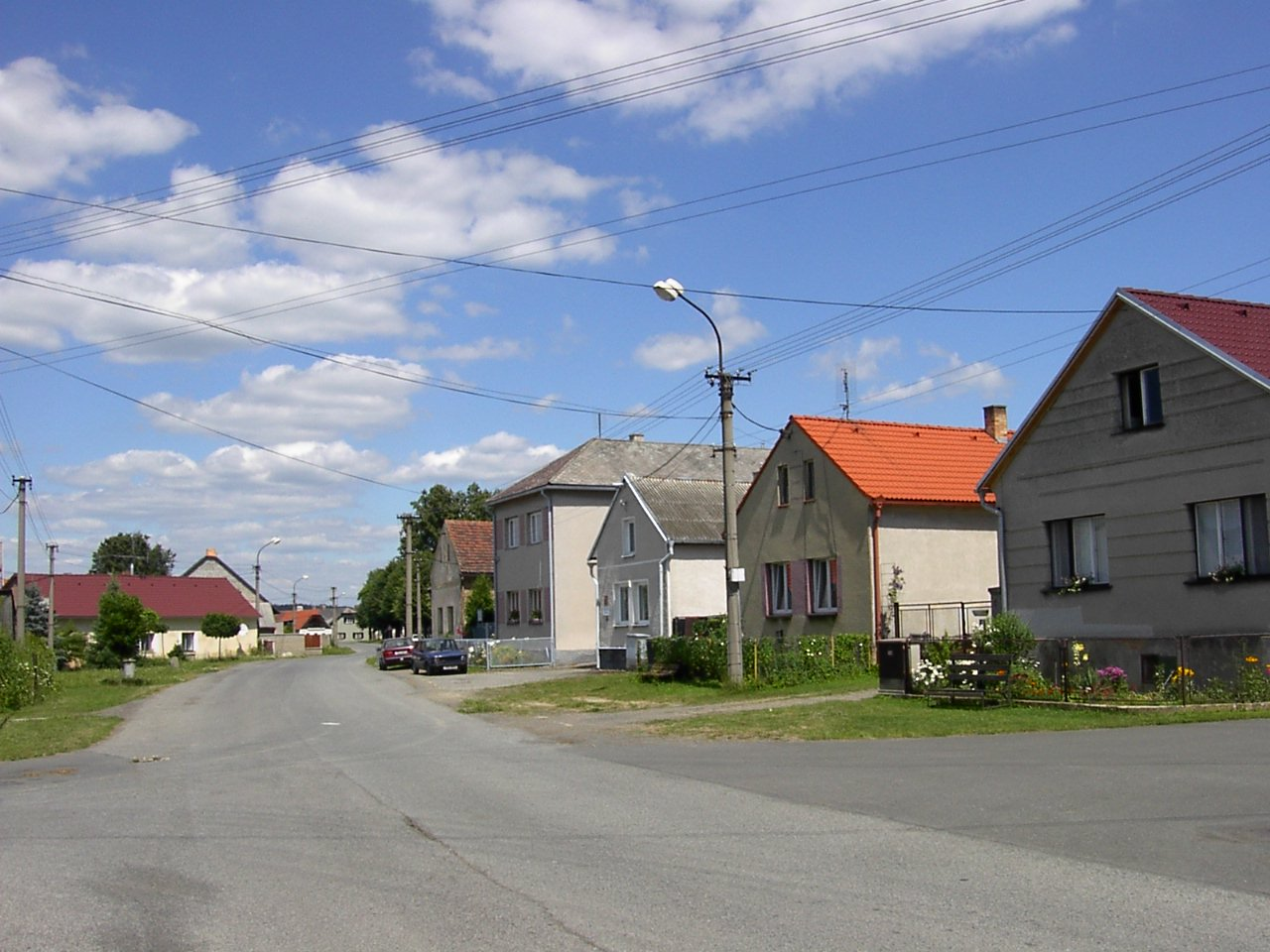 Main street in Cekov.